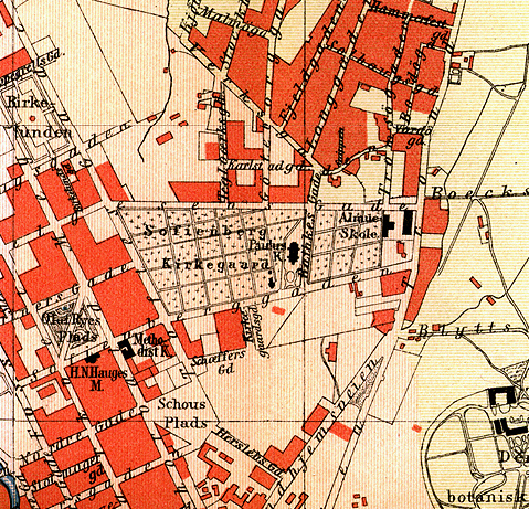 Kart over Sofienberg, 1887